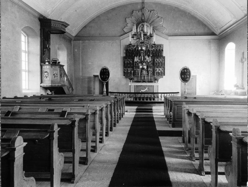 Interiör mot öster. Kategori: (02) InteriörerInteriör mot öster.